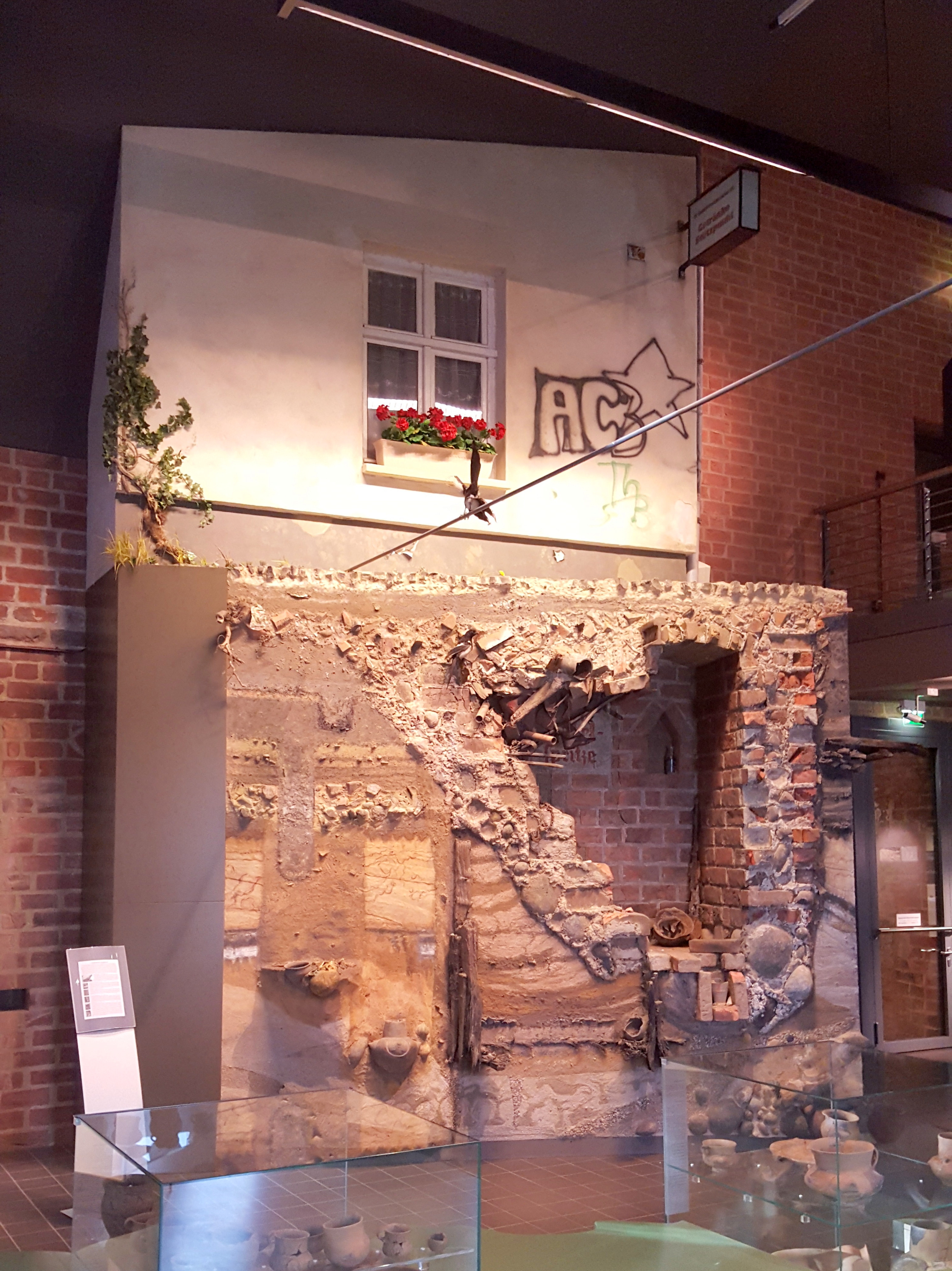 Stratigraphisches Großdiorama im Paulikloster von Thomas Bartel